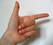 Chinesische Zahl Acht